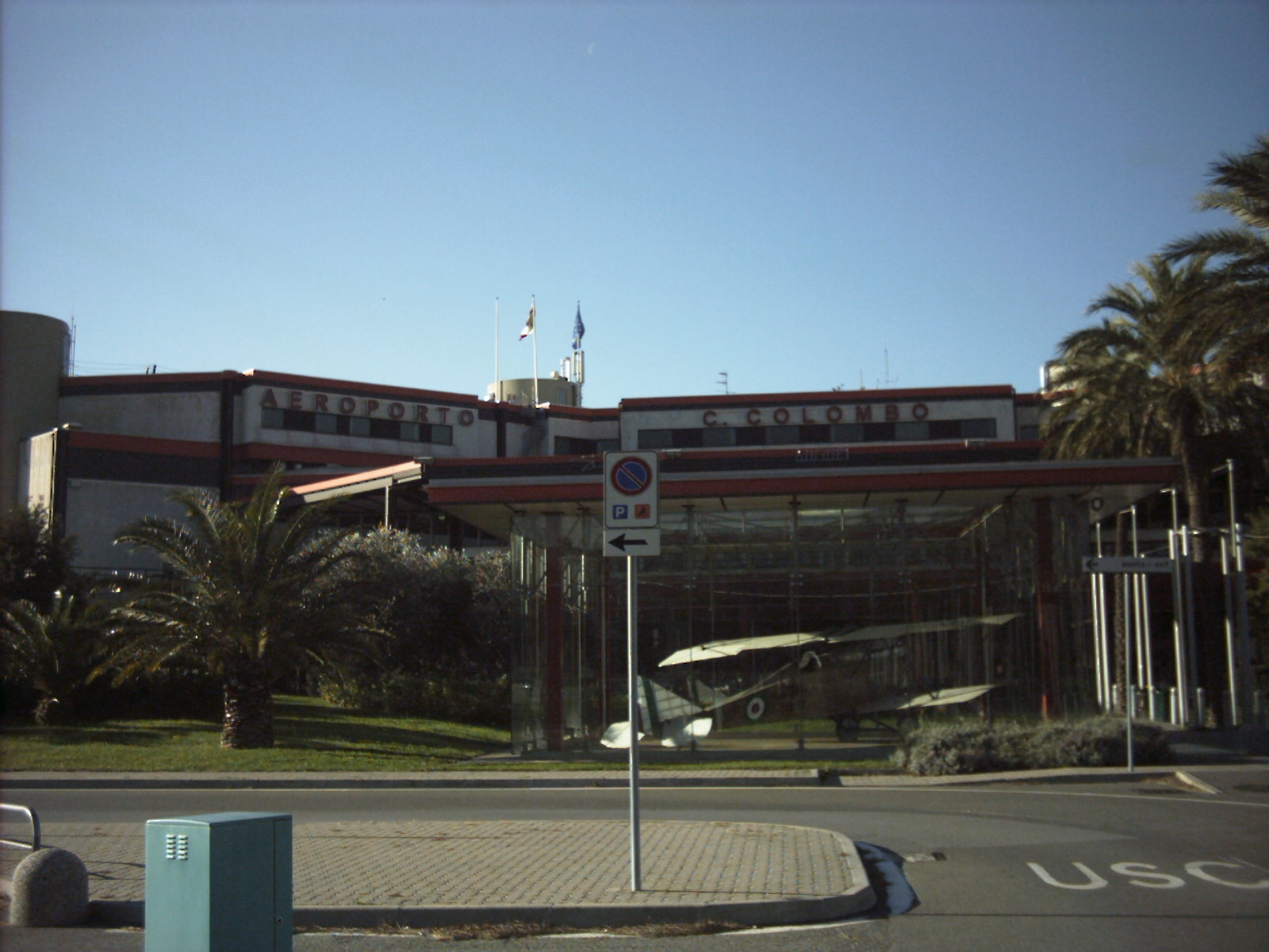 Aeroporto Cristoforo Colombo di Genova